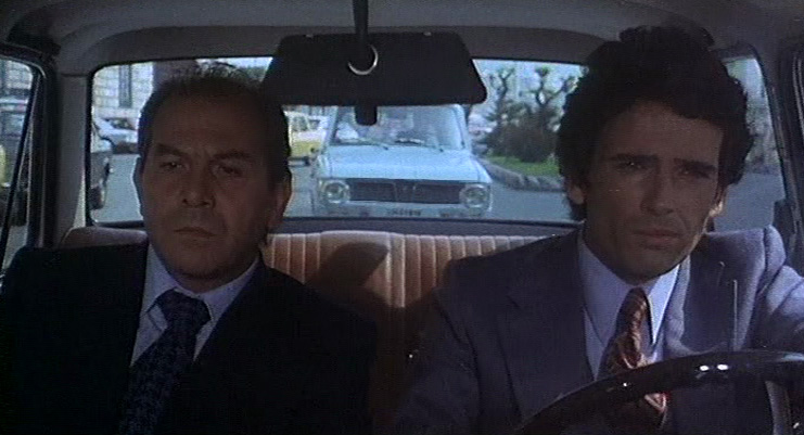 Screenshot da "La polizia interviene: ordine di uccidere!", de Giuseppe Rosati, 1975